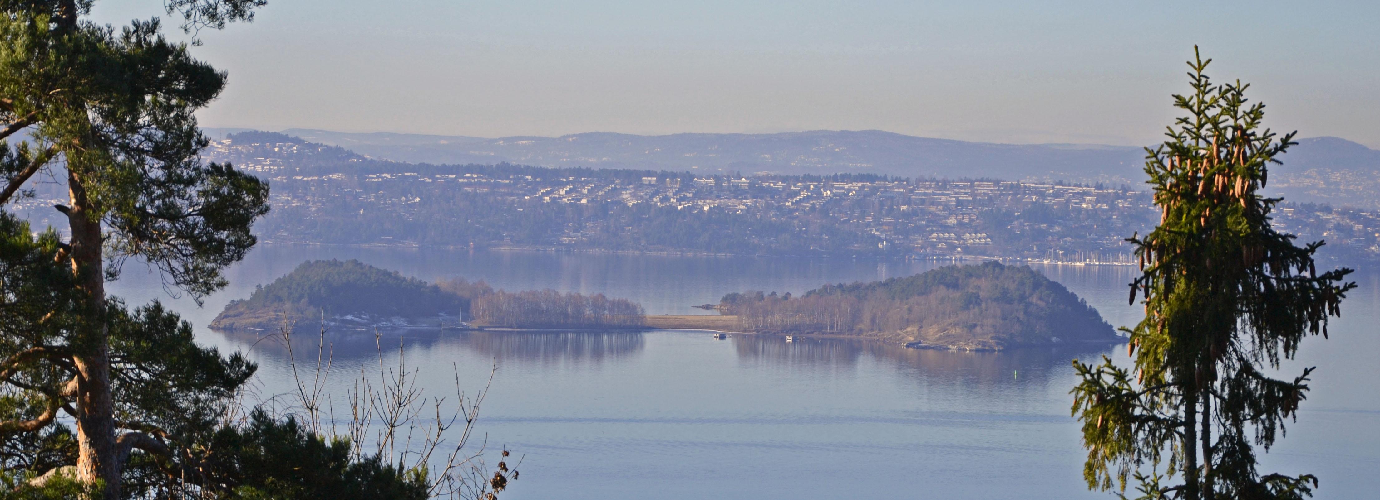 Langøyene sett fra Jomfrubråten, Ekeberg, Oslo